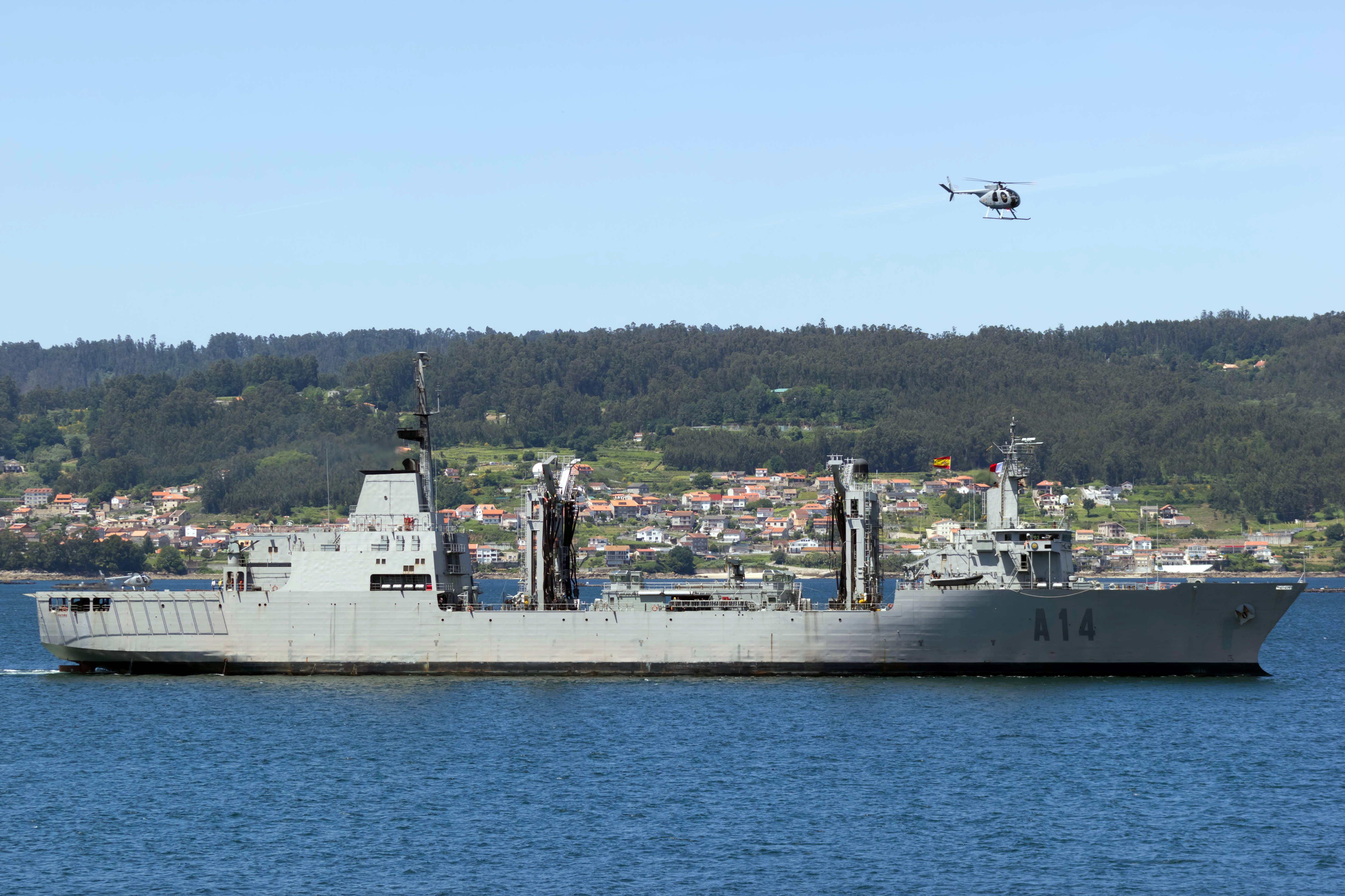 Buque de aprovisionamento da Armada española Patiño na ría de Pontevedra.